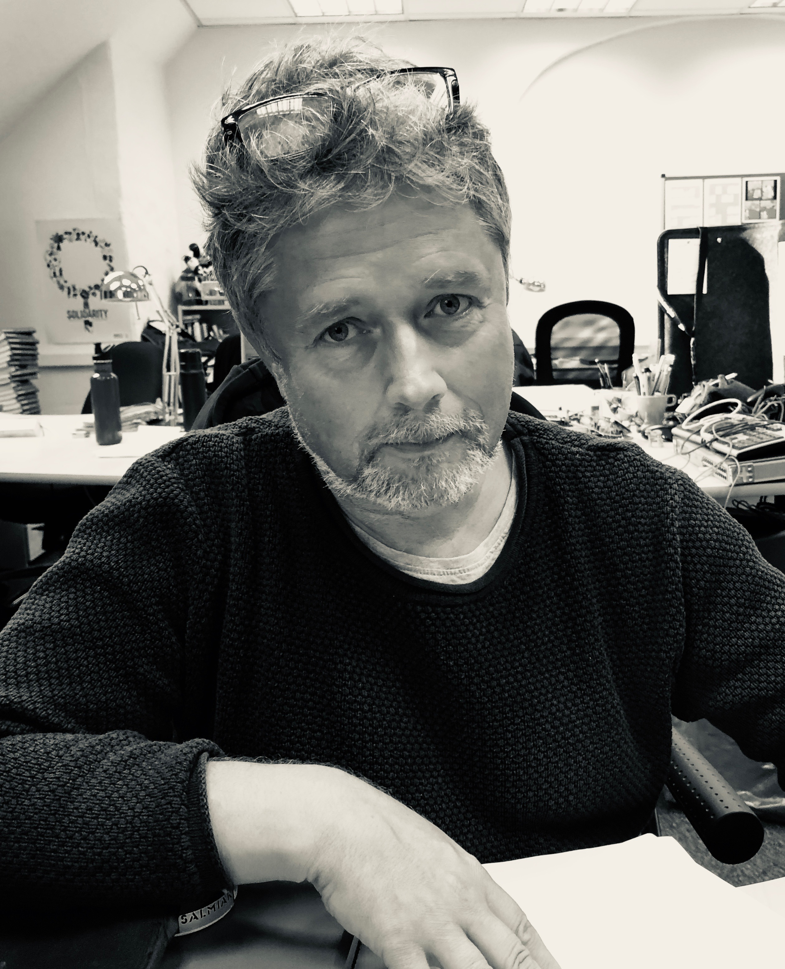 Hans Renhäll